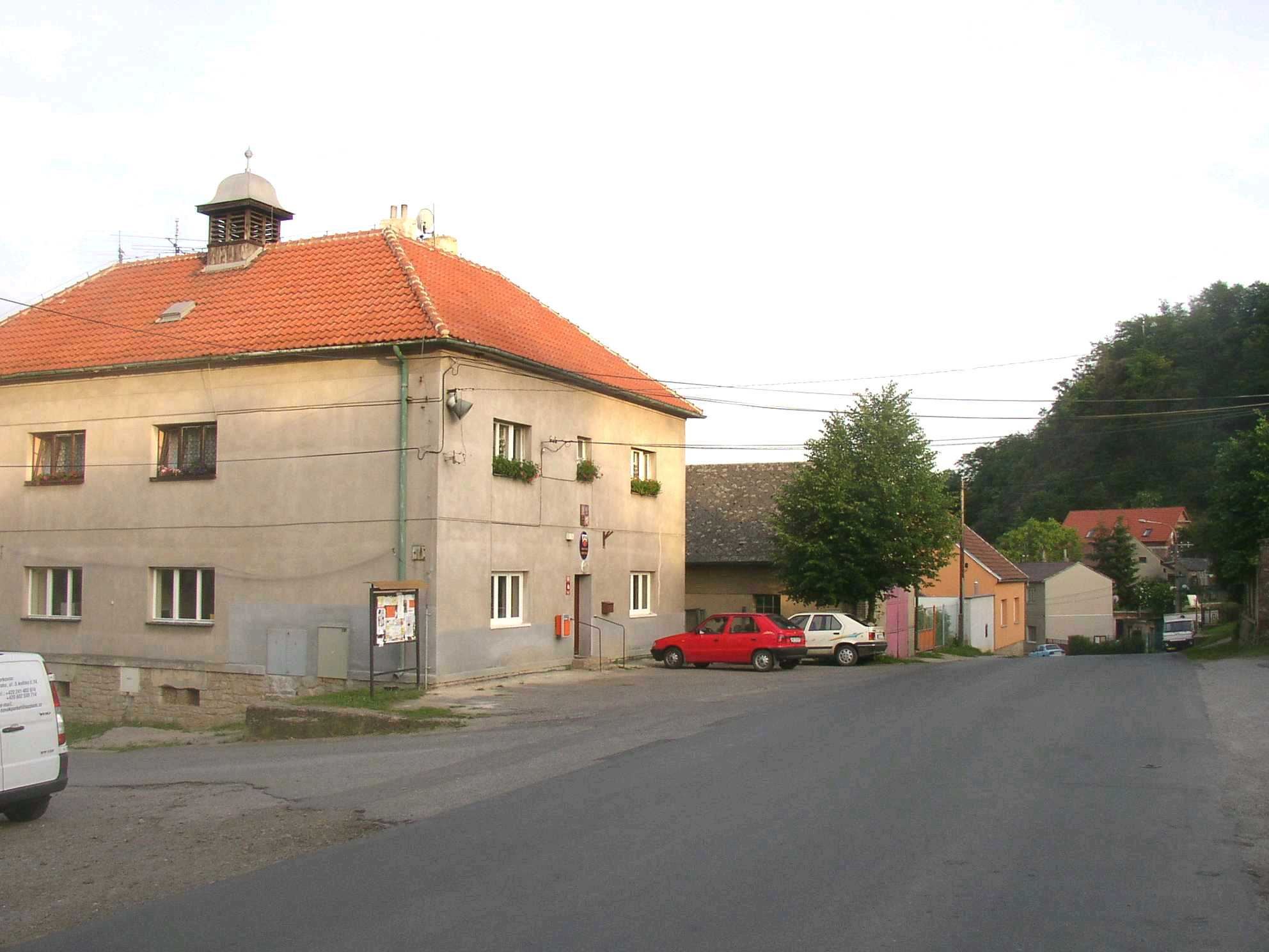 Chrustenice - budova obecního úřadu vyfotografoval Miaow Miaow v červnu 2005.